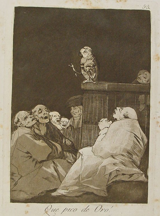 Capricho nº 53: ¡Que pico de oro! de Goya, serie Los Caprichos